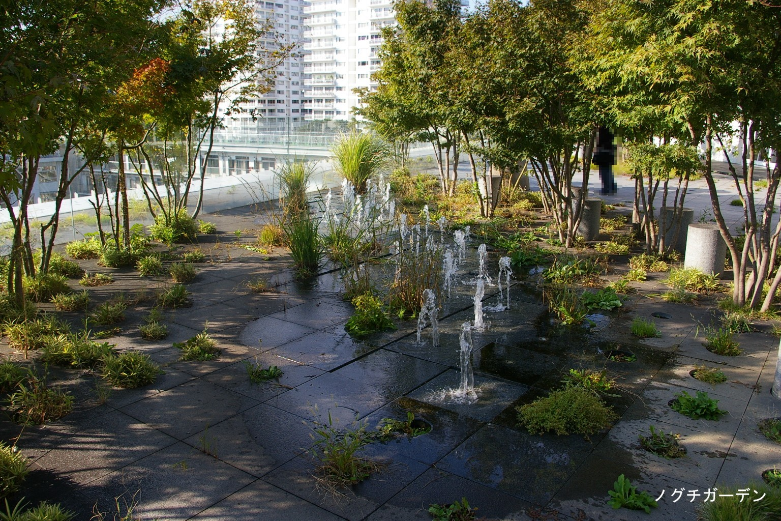 2009.5日本国内で塾生 (talk)が撮影。